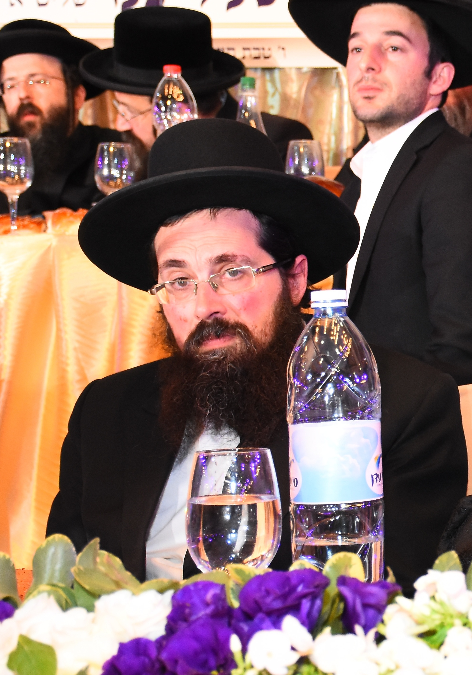 הרב אליעזר יהודה פינקל